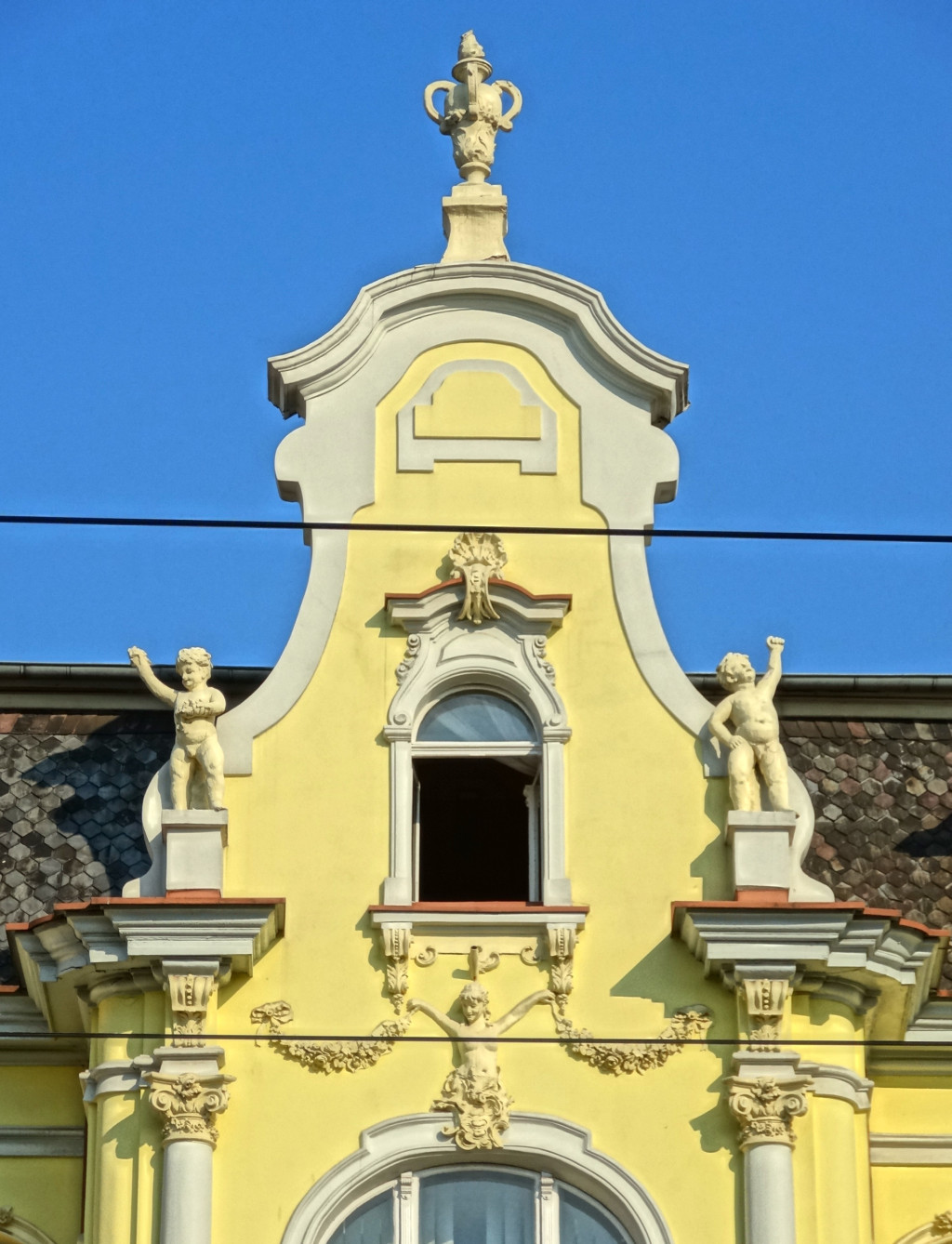 Kamienica przy ul. Gdańskiej 119 w Bydgoszczy, zbud. w 1896 r. wg proj. Fritza Weidnera